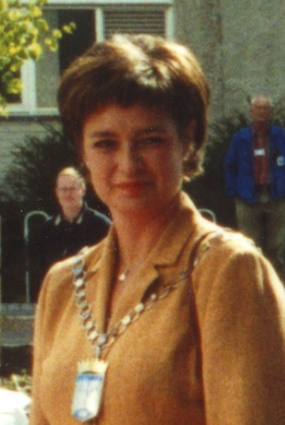 Ordfører Anne Kathrine Slungård (H) i Trondheim kommune ved innvielsen av Realfagsbygget ved NTNU Gløshaugen i 2000.